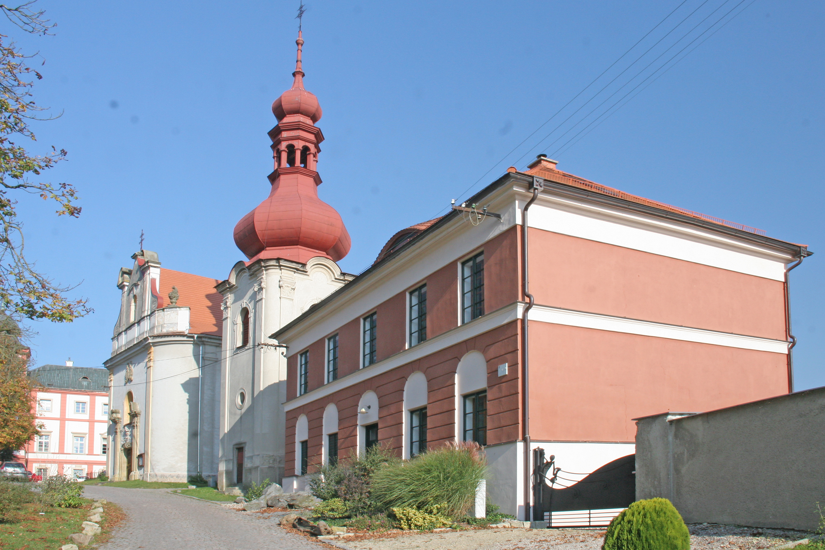 Kostel svatého Martina biskupa, Zámrsk.